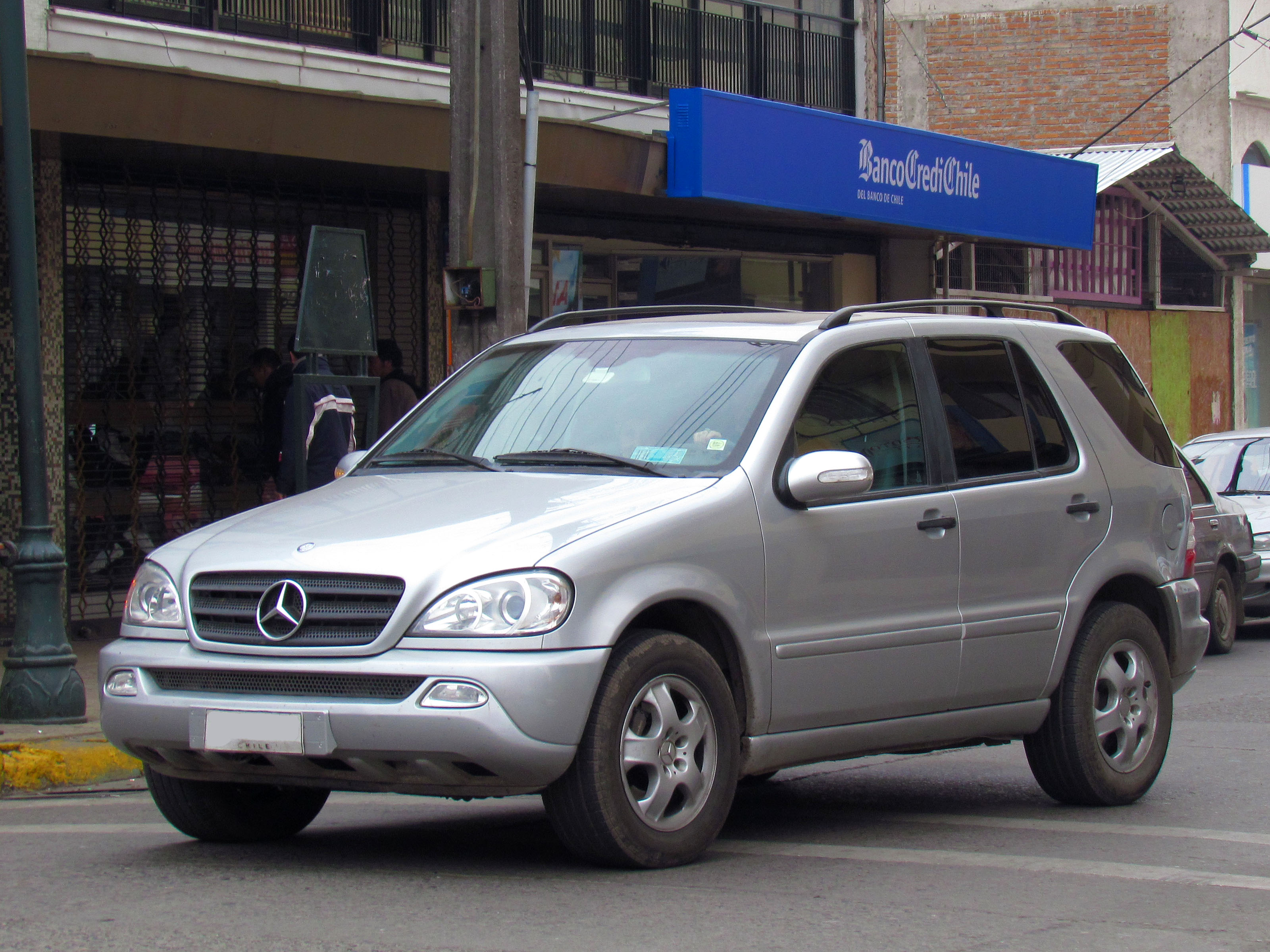 Mercedes Benz ML 270 CDi 2004